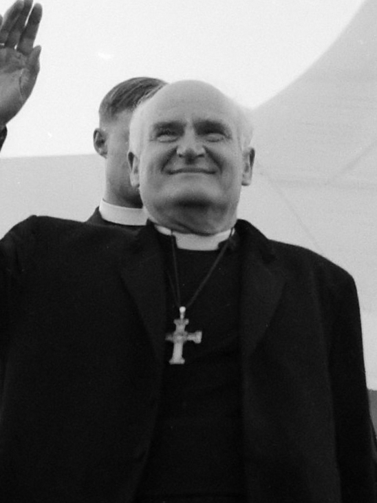 Aartsbisschop van Canterbury op Schiphol 18 september 1961